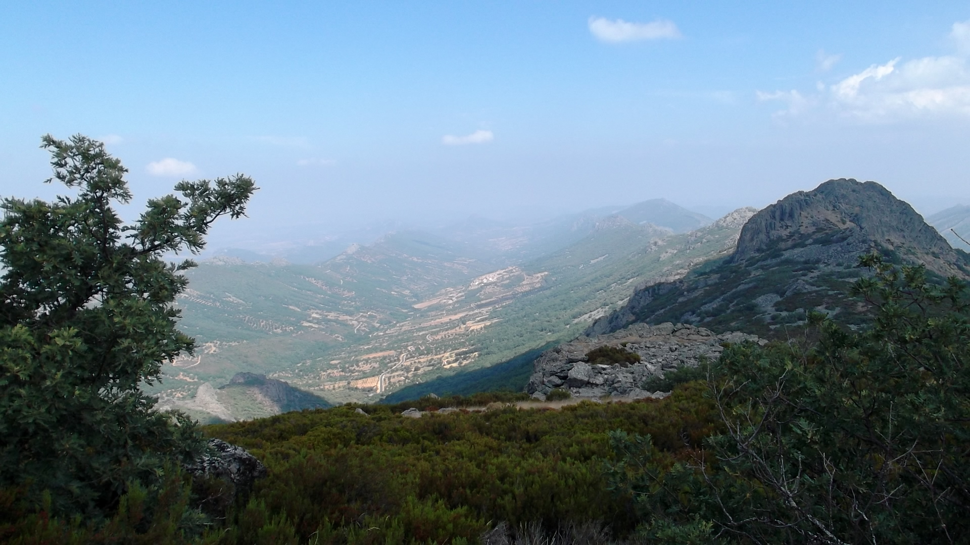 Navezuelas desde la villuerca